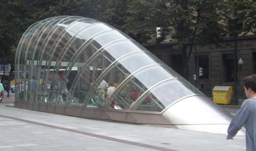 "Fosterito" du métro de Bilbao (Pays basque, Espagne); photo de Montréalais.